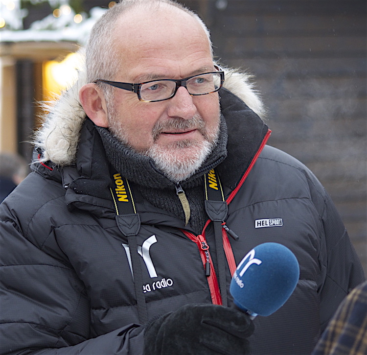 Nils Kåre Nesvold arbeider Nea Radio